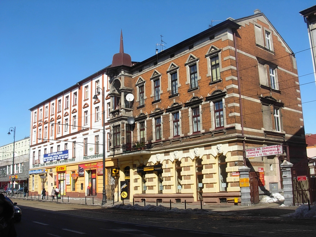 Kamienice ul. Dworcowa 98-100 w Bydgoszczy